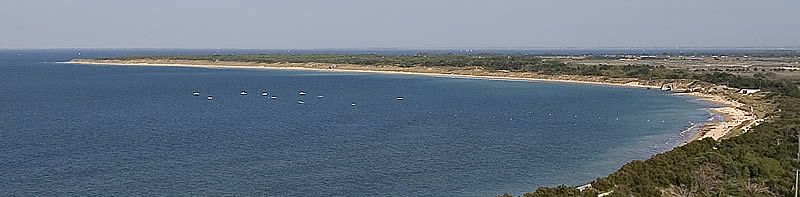 Pointe du Lizay - Côte nord à l'ouest de l'îŽle de Ré - Charente-Maritime Photo issue de ma banque d'images : Alain - Pep.per 1 octobre 2006 à 01:34 (CEST)